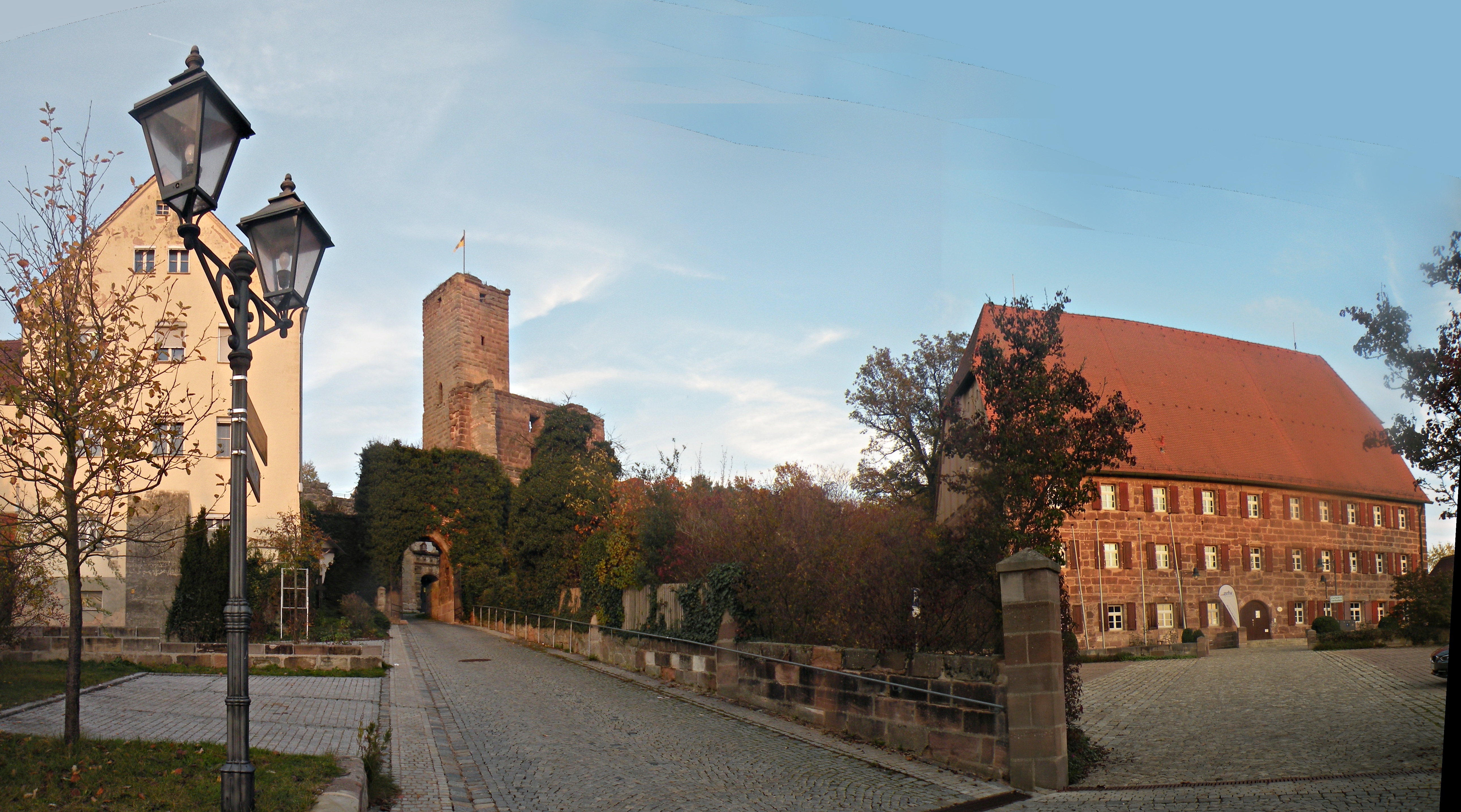 Замок Хильпольтштайн и служебное здание